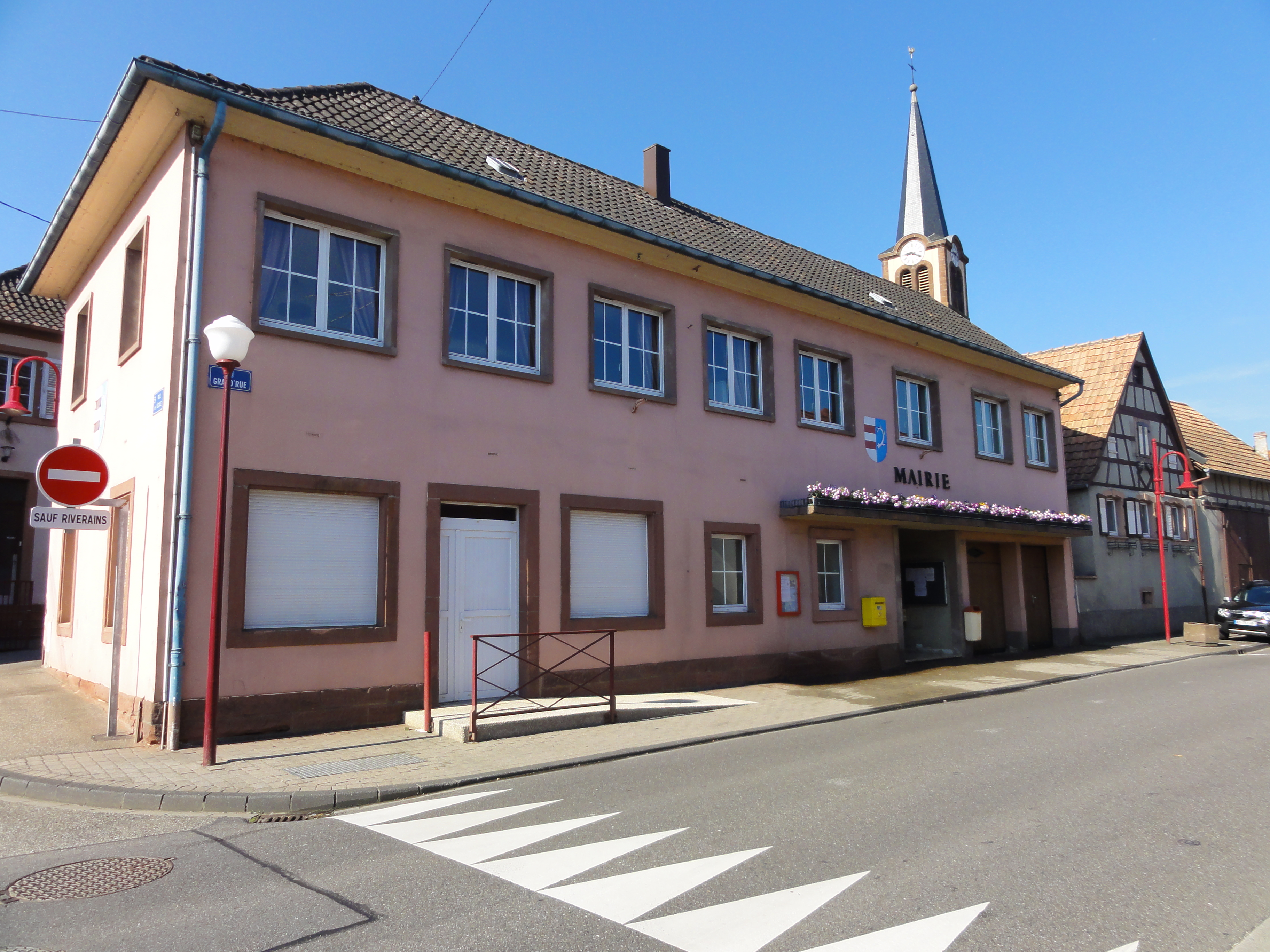 Alsace, Bas-Rhin, Niedermodern, Mairie (XXe), Grand'Rue.